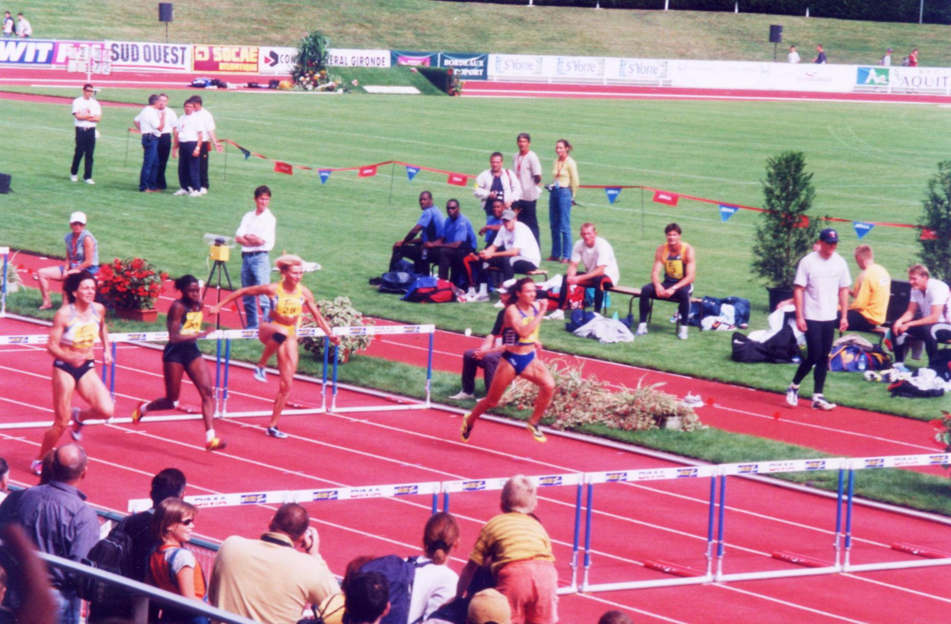 100 m haies féminin, Décastar 2001 (Talence)